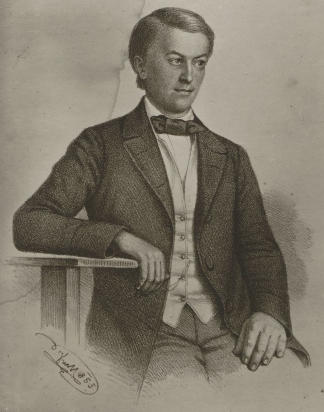 Tüb[ingen] Juli 1853""